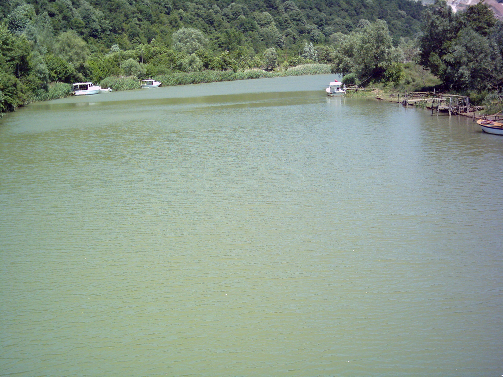 Bartın Çayı